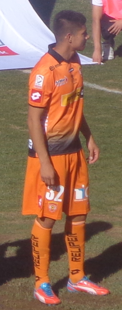 Jugador Eric Ahumada disputando un partido válido por el torneo de Apertura 2014-15 del fútbol Chileno, con la camiseta de Cobreloa.